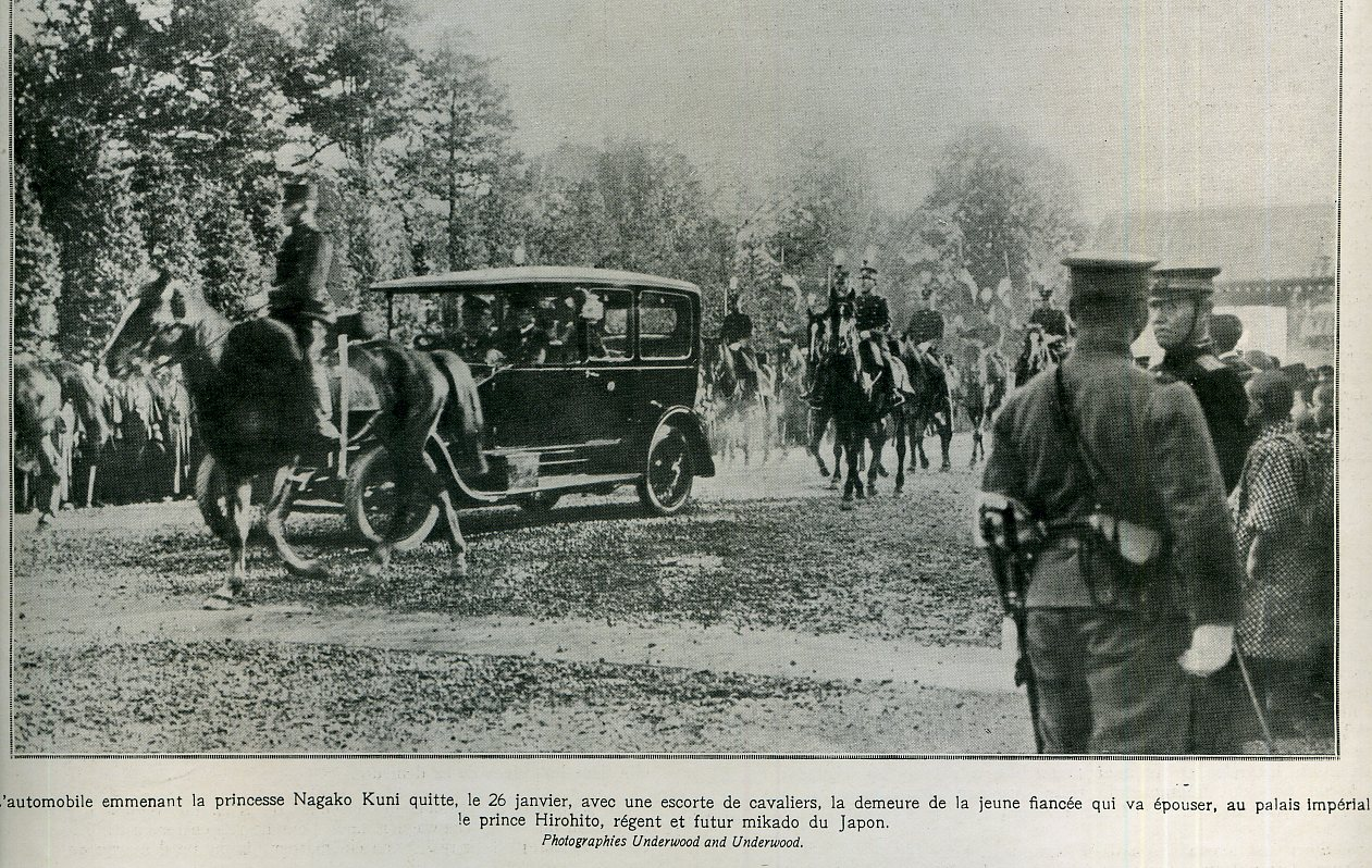 see picture